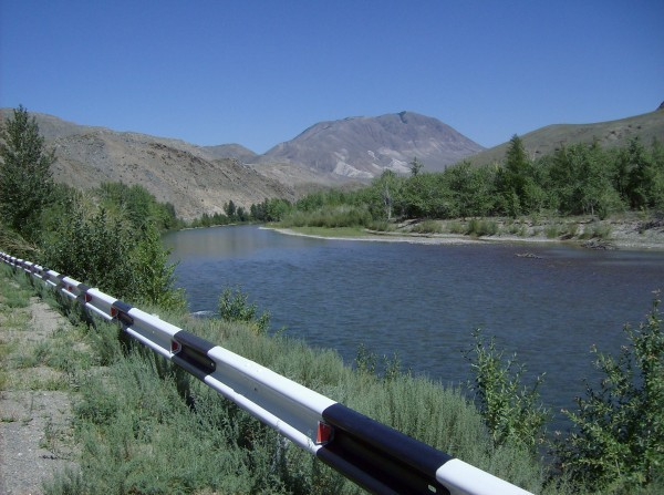 Тес-Хем рядом с Эрзином